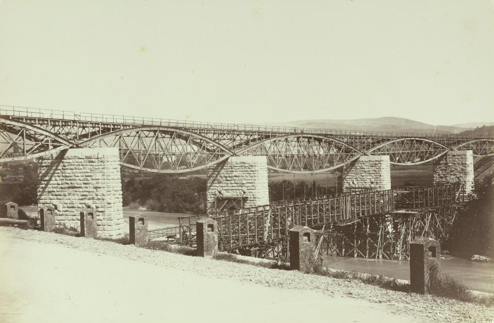 Bötzbergbahn: Aarebrücke bei Brugg